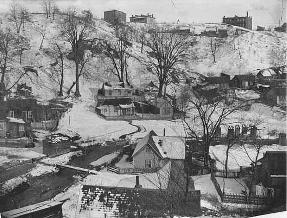 Swede Hollow, Phalen Creek can be seen